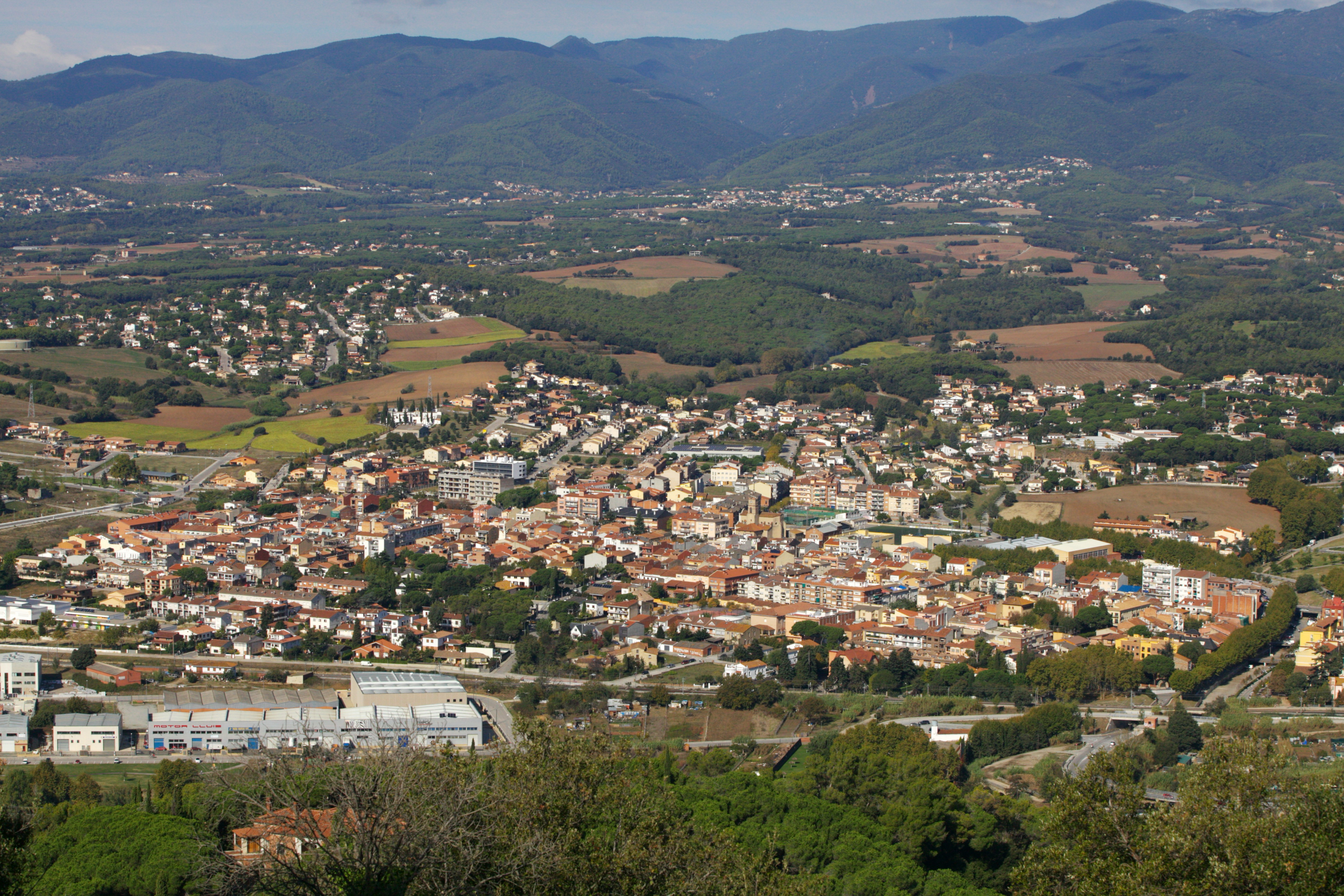 Vista general de Llinars del Vallès des del castell de Llinars